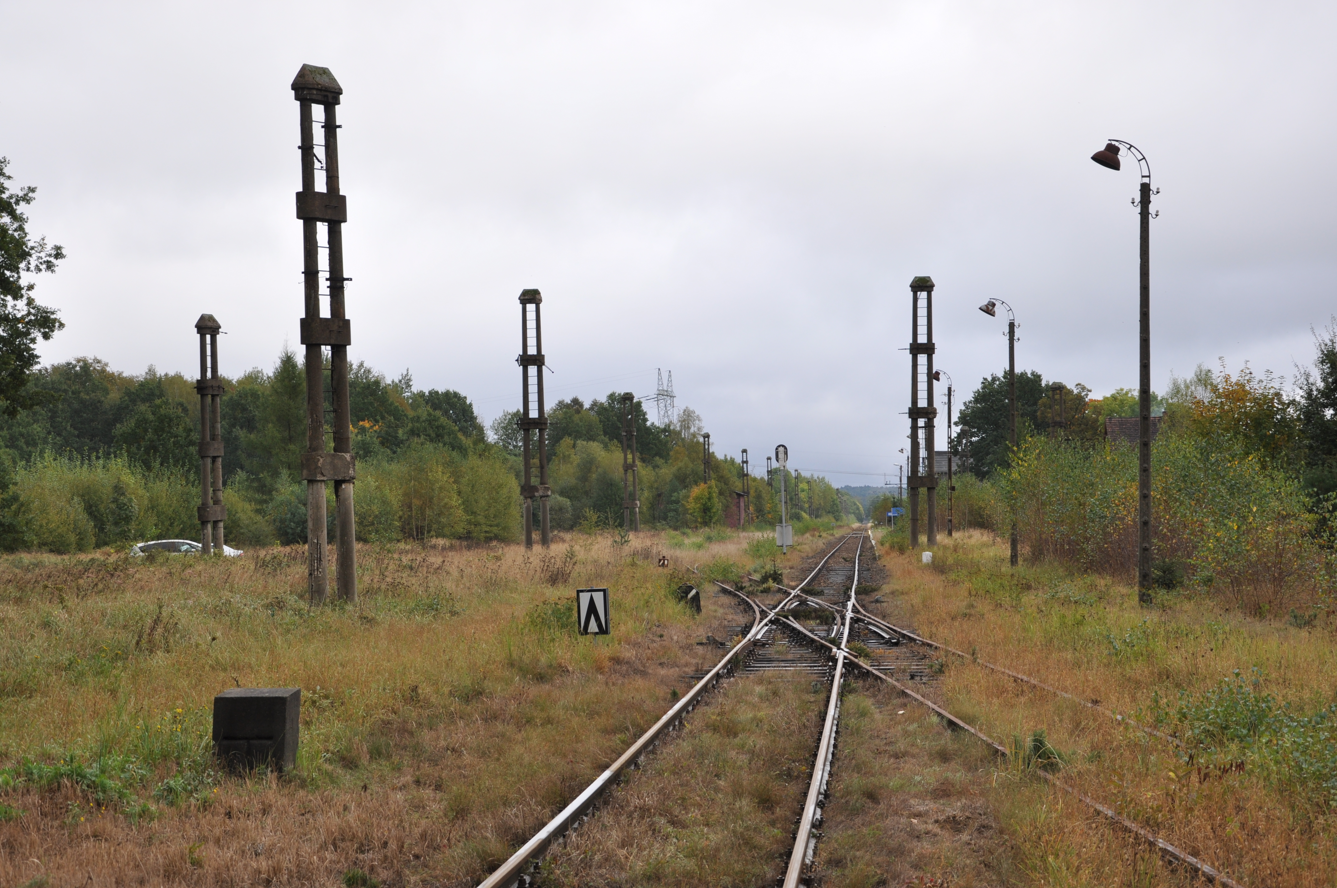 Stahlbeton-Abspannmasten für die Quertragewerke der ehemaligen Oberleitung im Bahnhof Mikułowa (Nikolausdorf) der Bahnstrecke Wrocław Świebodzki–Zgorzelec